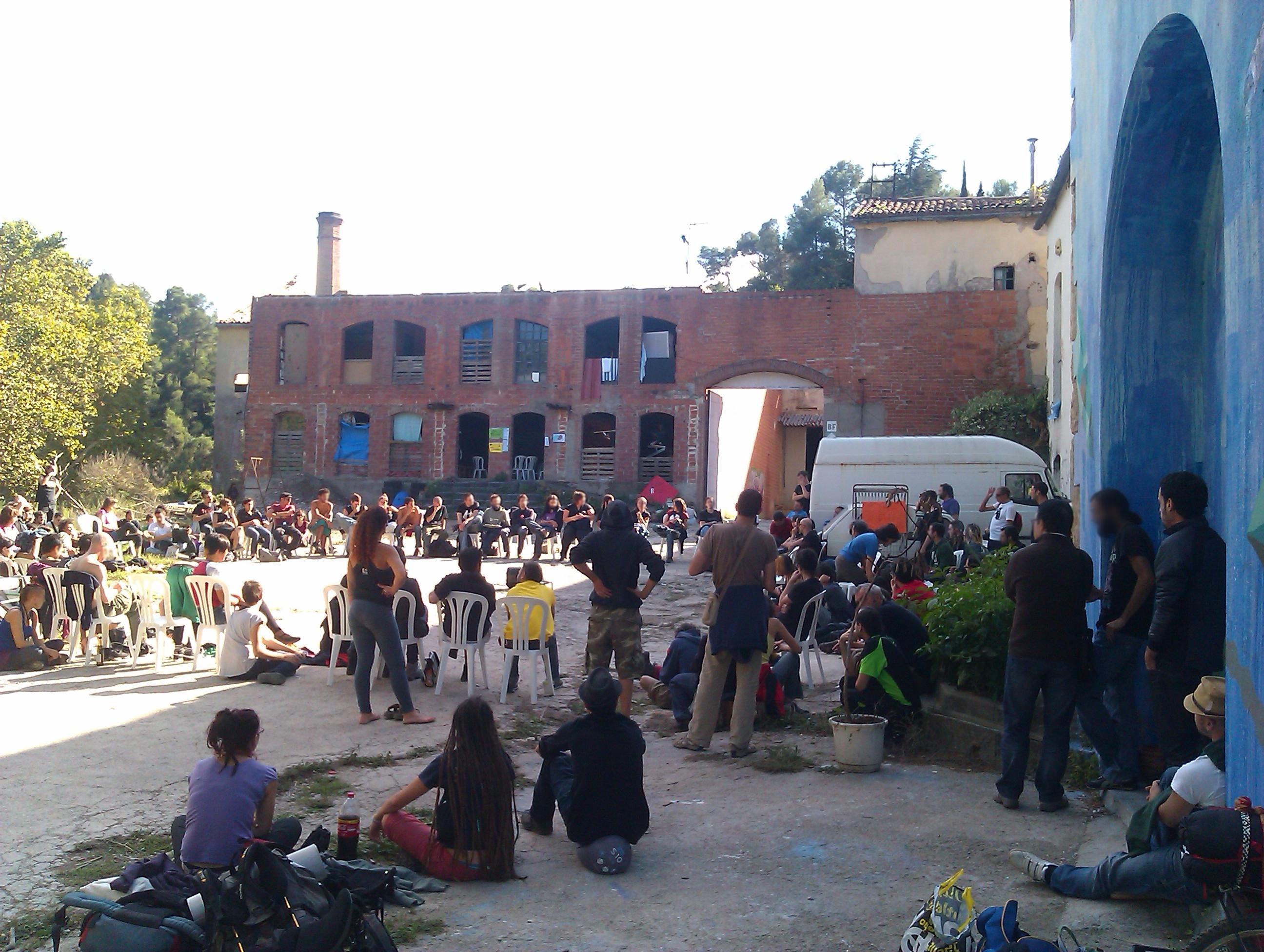 Assemblea dissabte 13 d'octubre de 2012 al hackmeeting Hackafou a Ca la Fou, Colònia Industrial Postcapitalista (Vallbona d'Anoia)